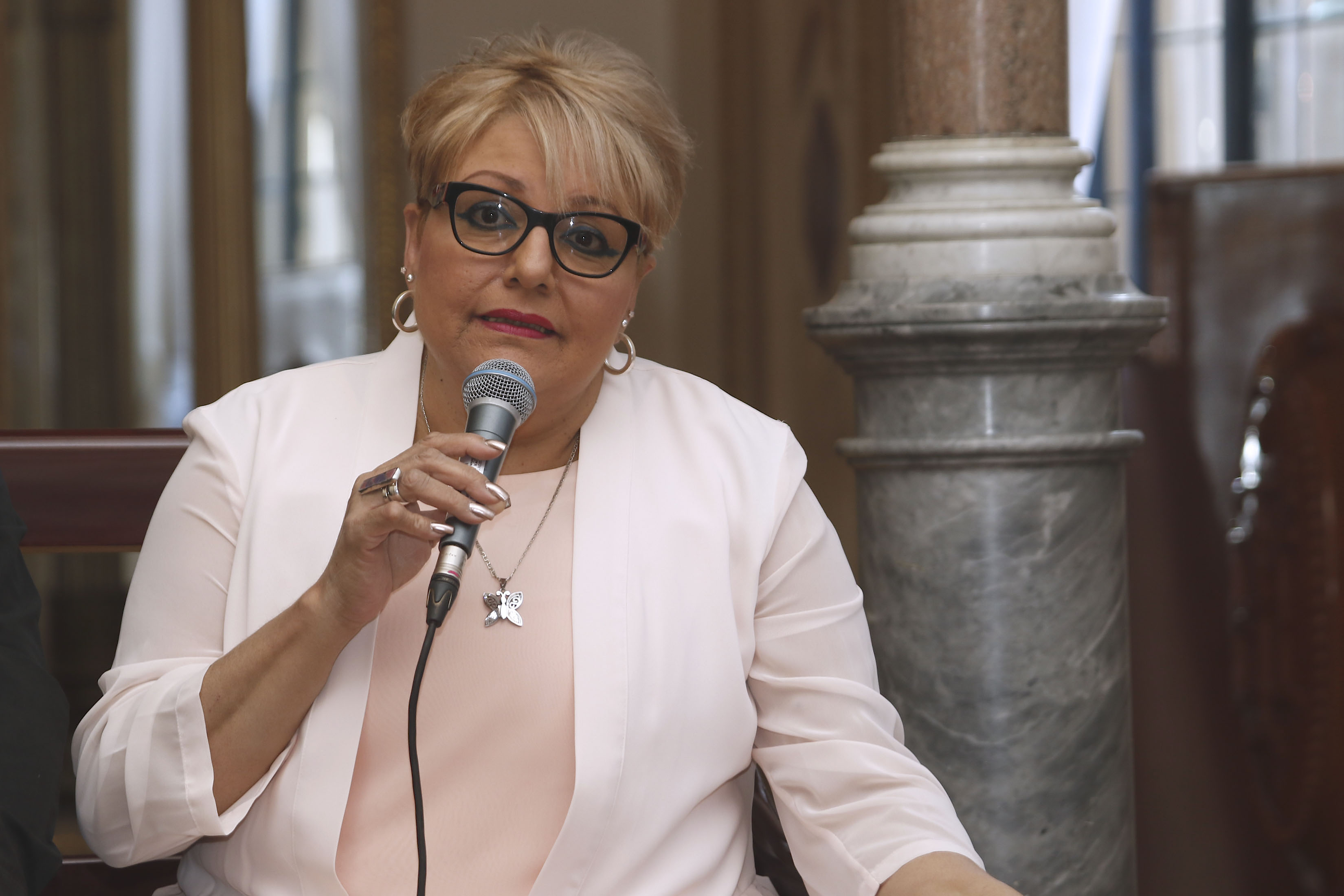 Lunes 15 de mayo de 2018. En el Foyer del Teatro de la Ciudad Esperanza Iris, el cantante de boleros Rodrigo de la Cadena, ofreció una conferencia de prensa, junto a Meme Solís y Malena Burke, para presentar el concierto que dará el próximo 20 de mayo en el recinto mencionado, acompañado por una Big Band y una orquesta, que lleva el nombre de su nuevo disco Lo que me piden mis amigos. Fotografía: Milton Martínez / Secretaría de Cultura CDMX.